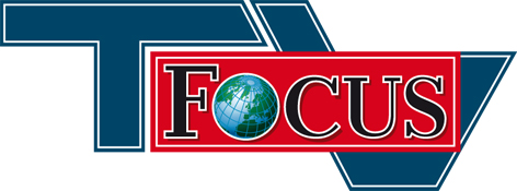 Unternehmenslogo FOCUS TV